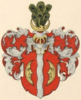 Lepsi suguvõsa aadlivapp